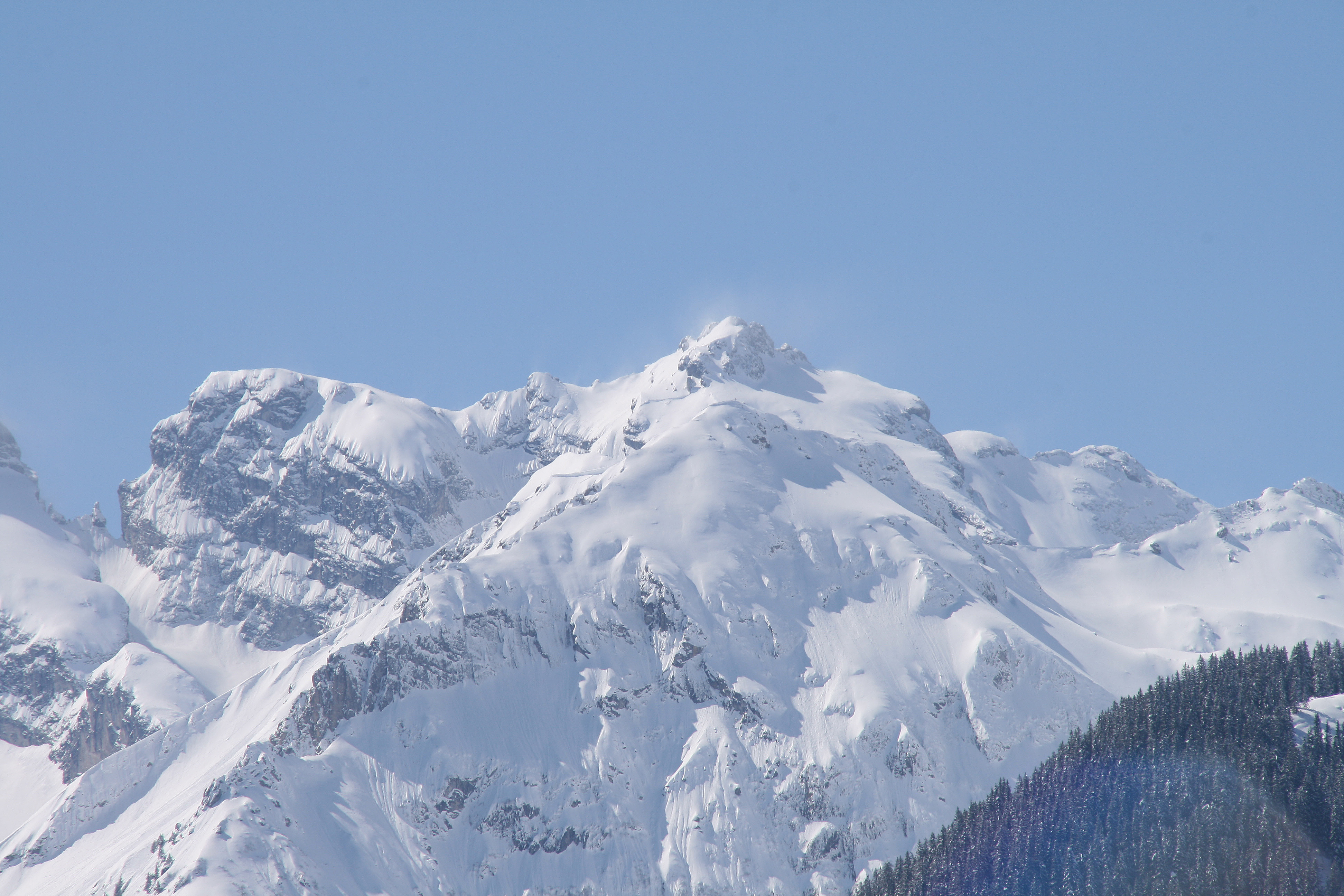 Blick vom Bergpanoramastandort neben der Kirche in Bartholomäberg auf die gegenüberliegenden Berge des Rätikon. Hier die Drusenfluh mit 2827m und direkt darunter die Geißspitze mit 2334m Links im Bild sieht man sehr gut das Eisjöchle mit 2638m , das den Hauptgrat zu den Drei Türmen unterbricht.